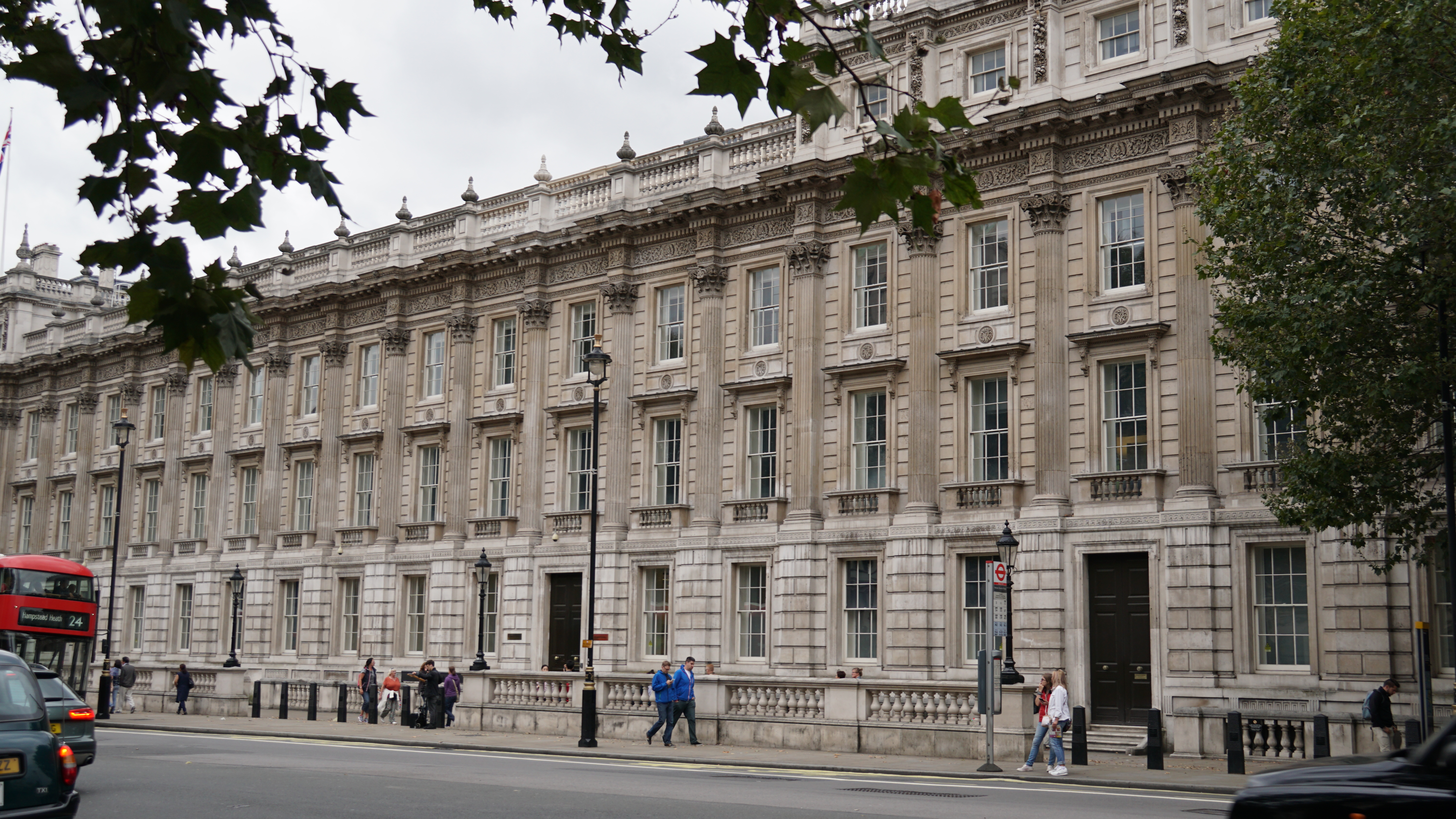 A little visit in London Une petite visite a Londres